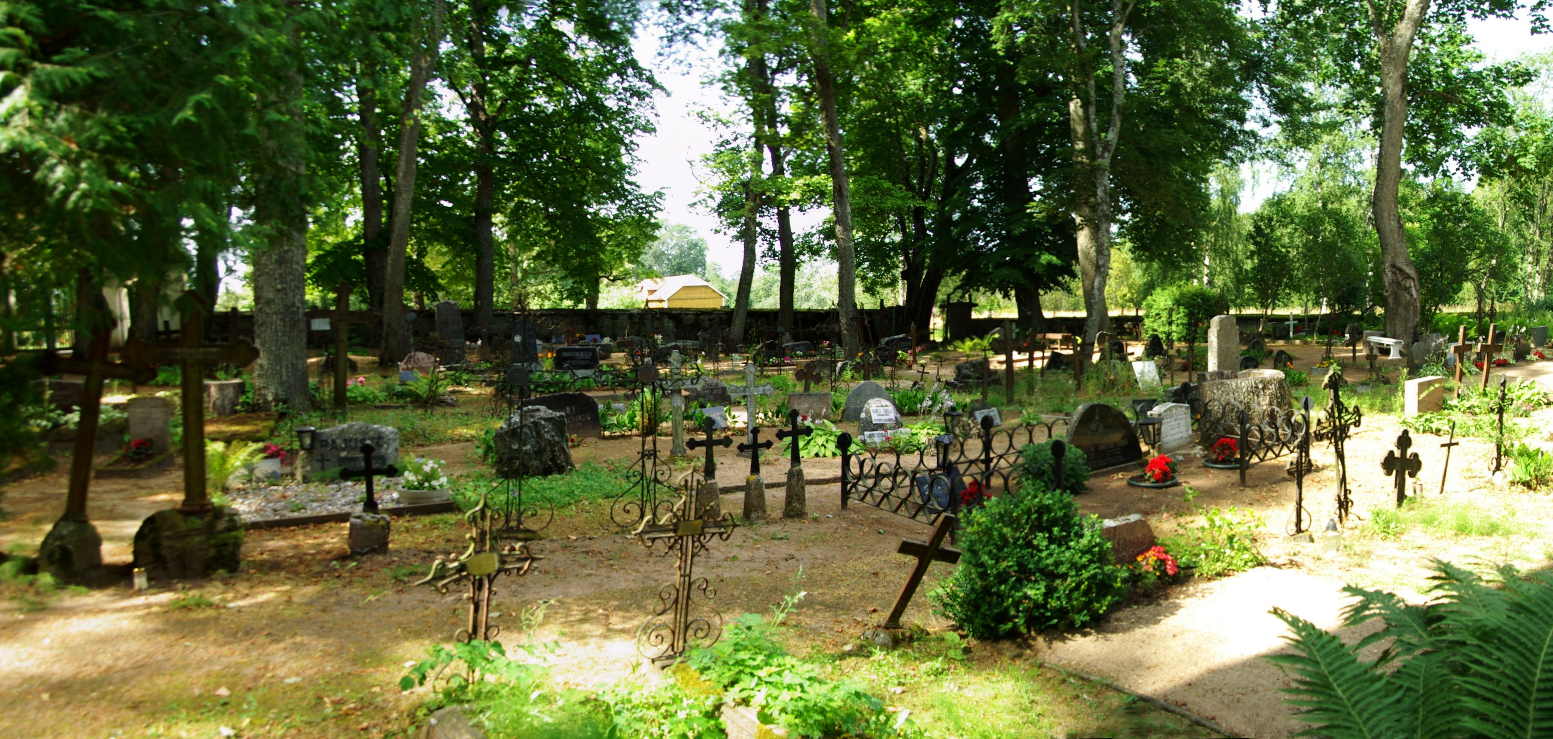 Ilumäe kalmistu